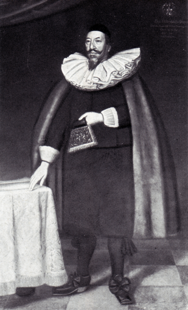 Hermann von Dorne (* 1585; † 1665), Lübecker Bürgermeister